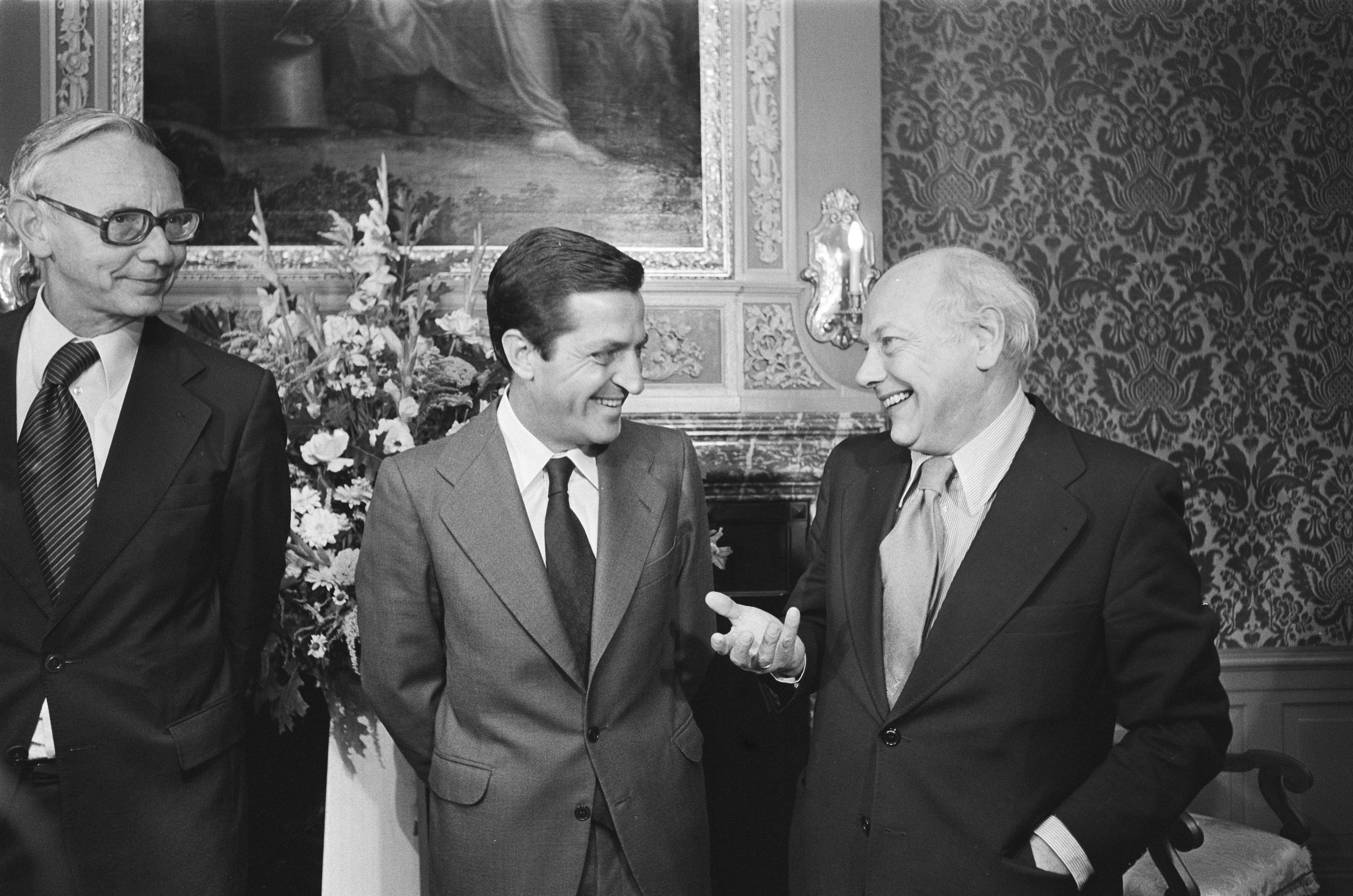 Collectie / Archief : Fotocollectie Anefo Reportage / Serie : [ onbekend ] Beschrijving : Bezoek Spaanse premier Suarez minister van Buitenlandse Zaken , Oreja Aquirre , nr. 10 v.l.n.r. Oreja Aquirre , Van der Stoel , Suarez, Den Uyl Datum : 29 augustus 1977 Locatie : Spanje Trefwoorden : bezoeken, politiek Persoonsnaam : Uyl, Joop den Fotograaf : Verhoeff, Bert / Anefo Auteursrechthebbende : Nationaal Archief Materiaalsoort : Negatief (zwart/wit) Nummer archiefinventaris : bekijk toegang 2.24.01.05 Bestanddeelnummer : 929-3263